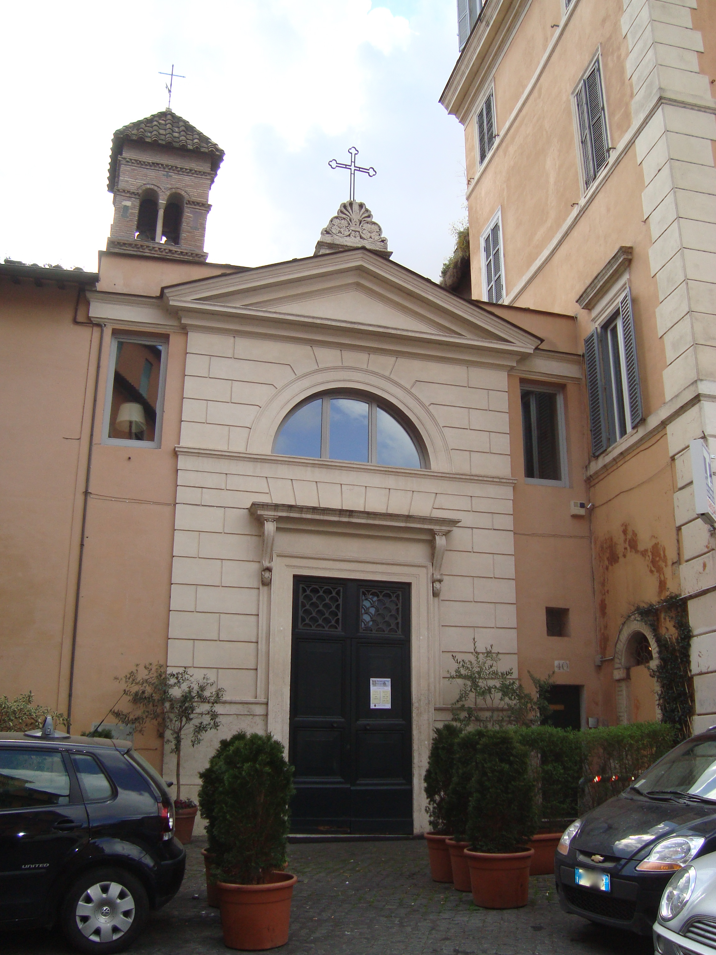 Vue externe de l'église San Benedetto in Piscinula à Trastevere, Rome